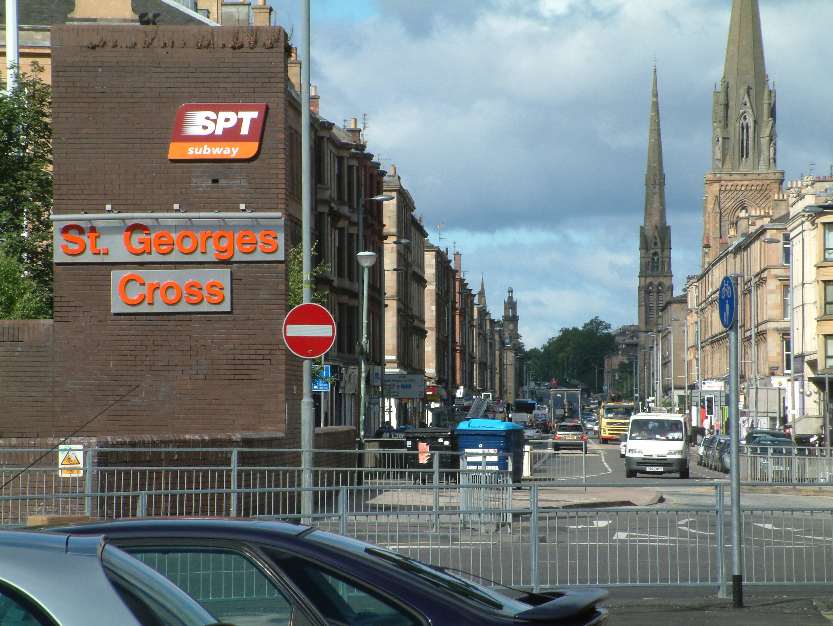 St. George's Cross a ulice Great Western Road.